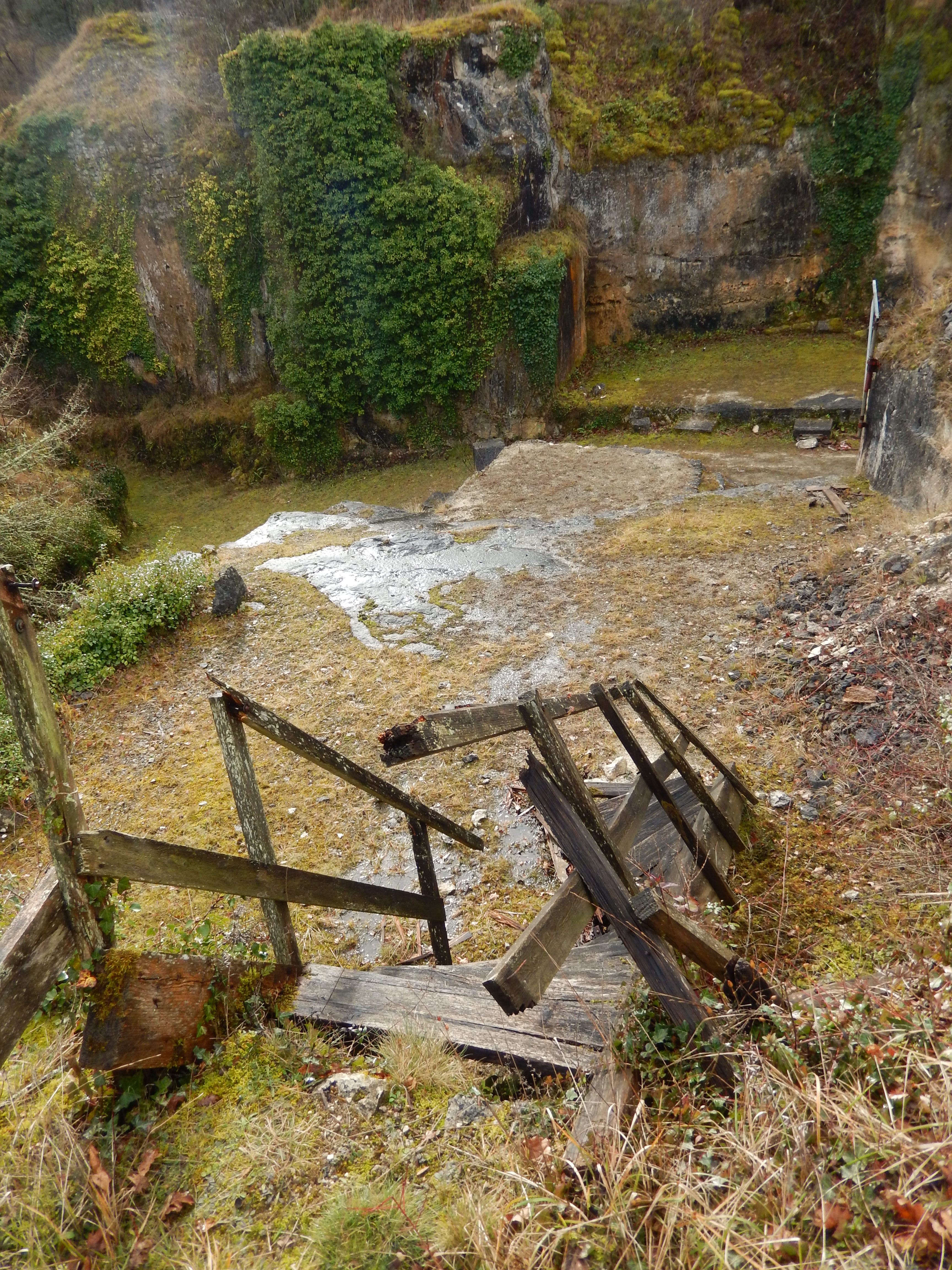 Un escalier cassé, dans une partie librement accessible des anciennes carrières de pierre de Crazannes (Charente-Maritime, France).